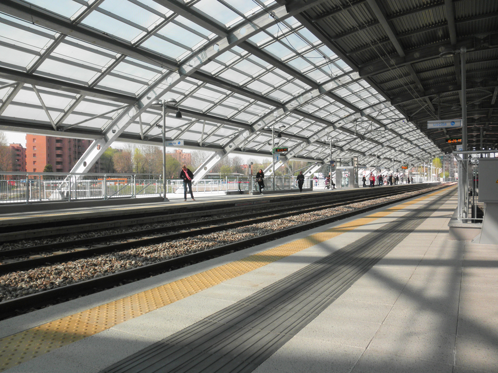 Stazione ferroviaria di Milano Nord Affori.